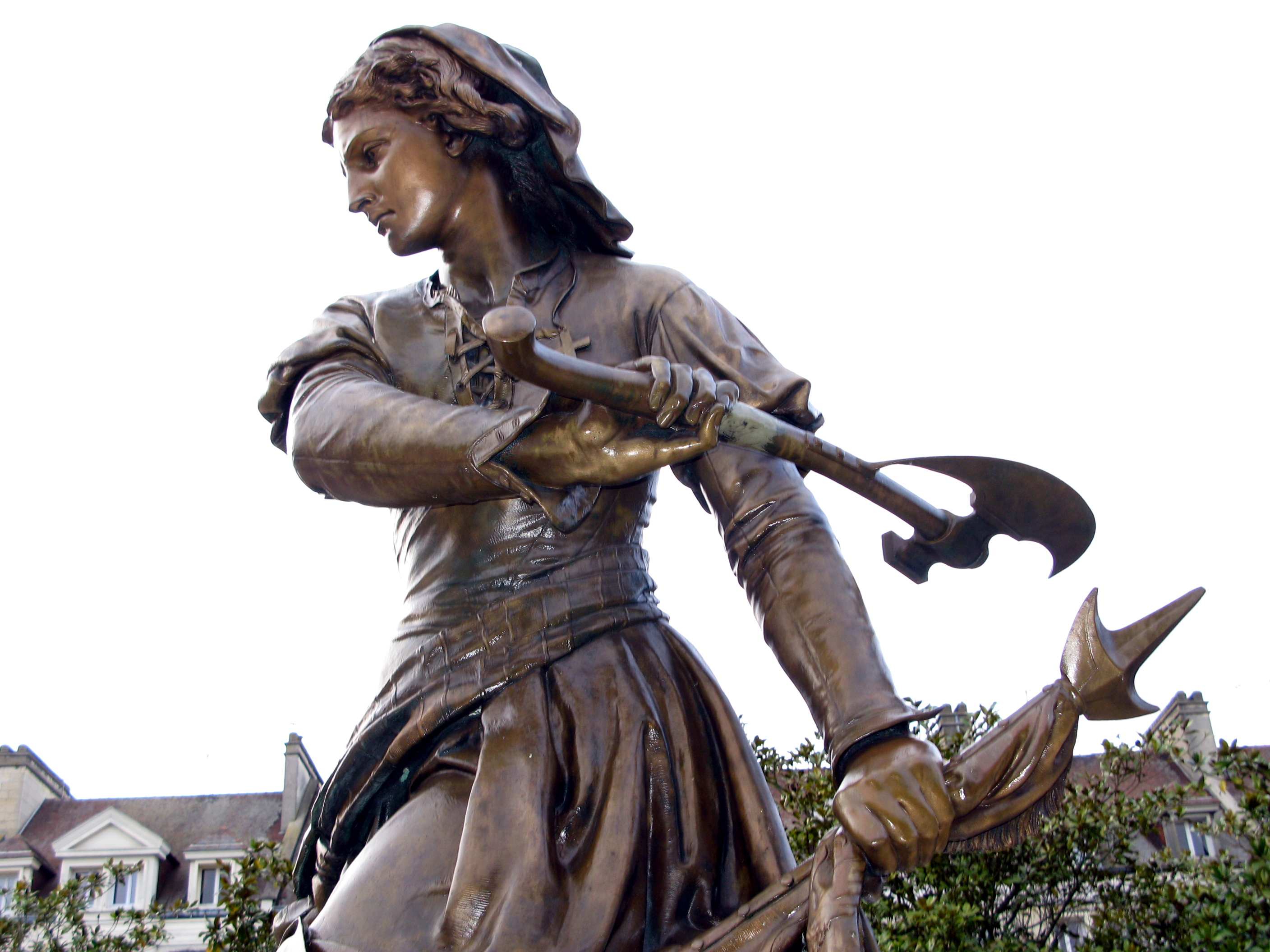 Beauvais (Oise, France) - Statue de Jeanne Hachette.